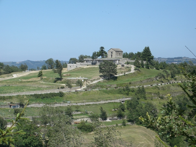 B.F.